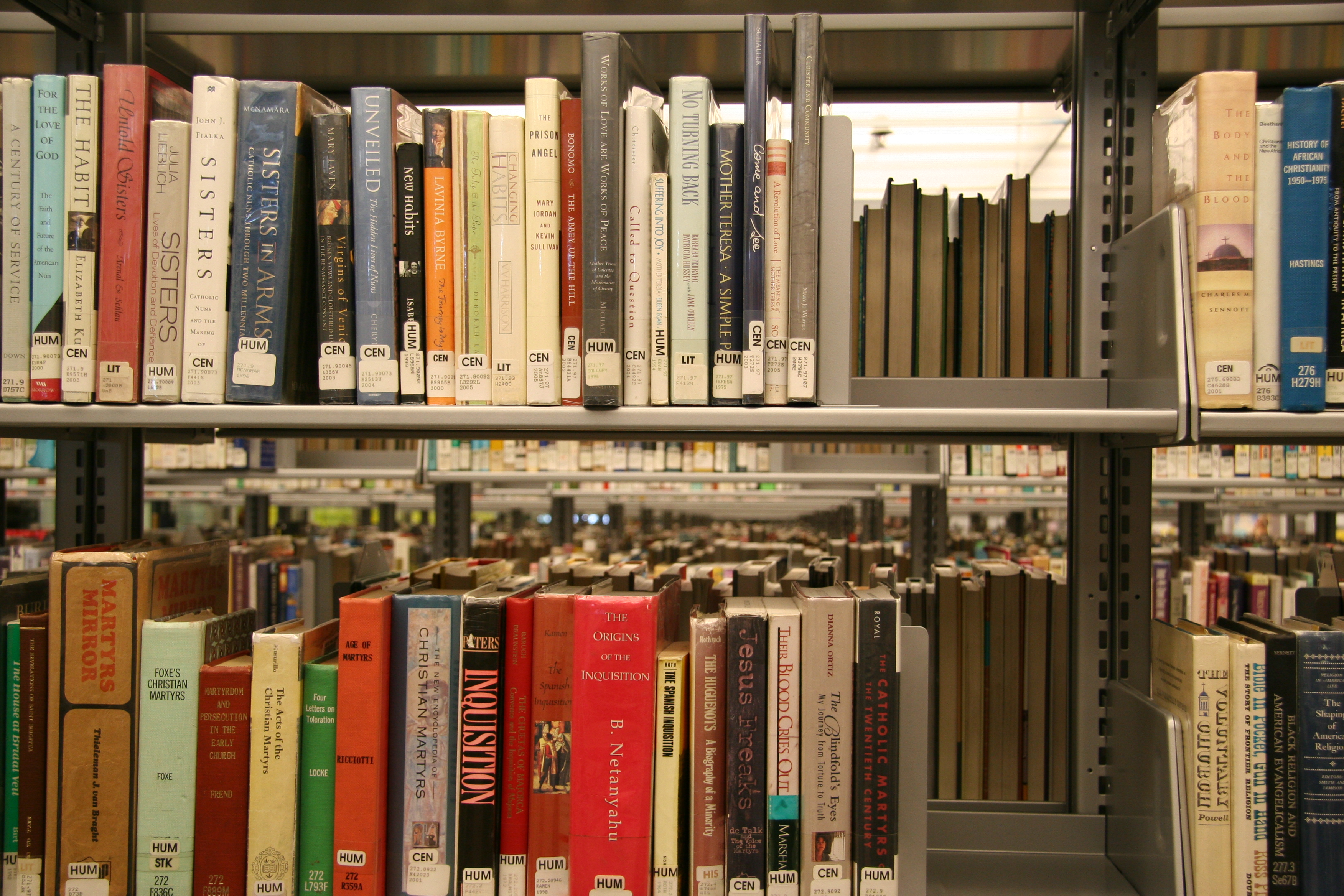 i100106 060